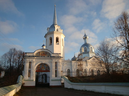 Храм Иоанна Богослова